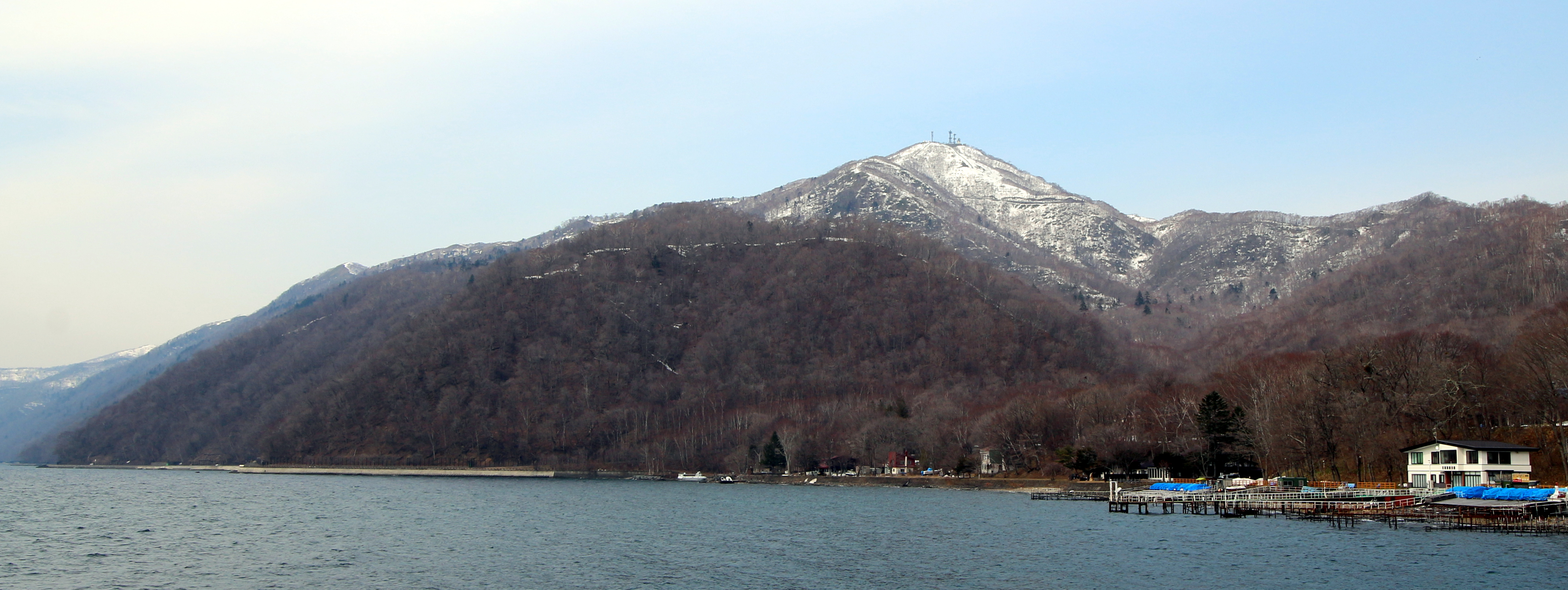 Mount Monbetsu on Lake Shikotsu, Hokkaido.